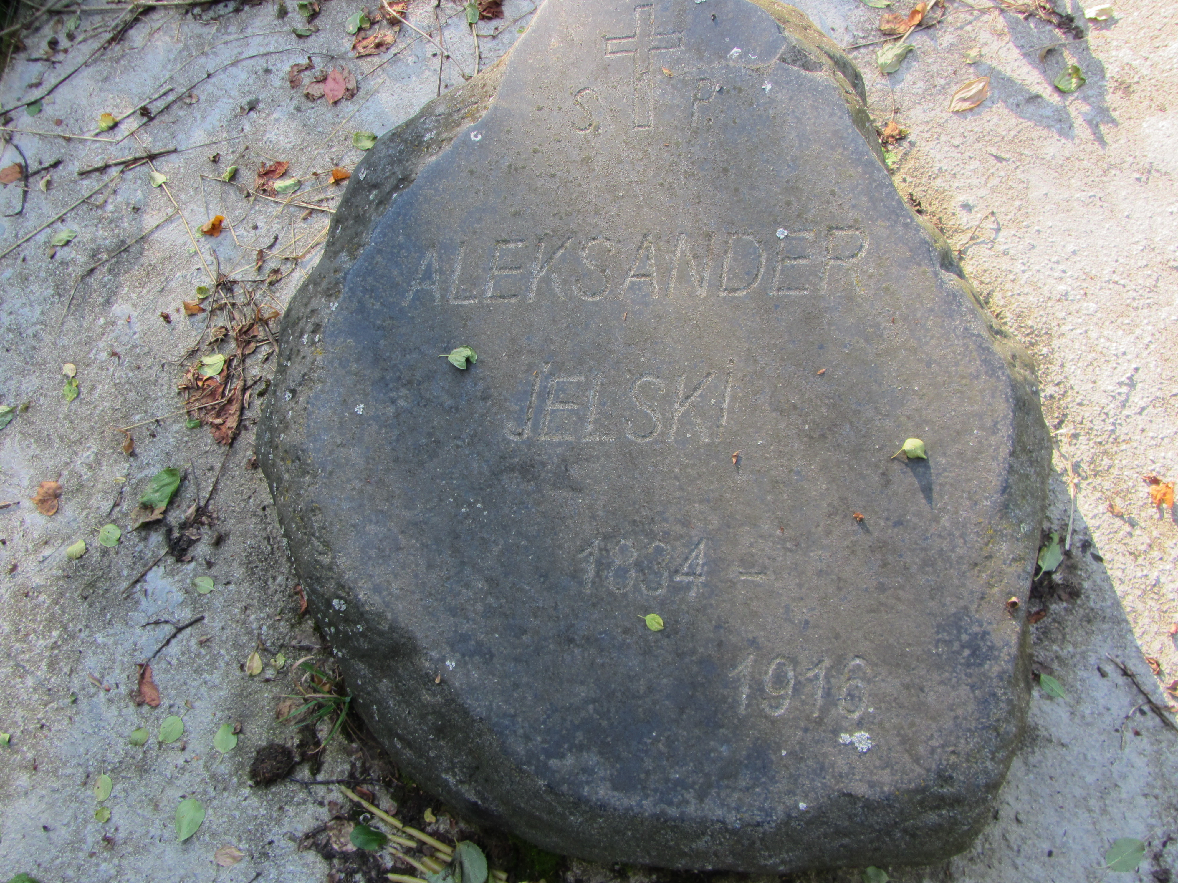 Беларуская (тарашкевіца): Помнік Аляксандру Ельскаму, на сямейным пахаваньні Ельскіх ва ўрочышчы Кобань, побач з Дудзічамі.